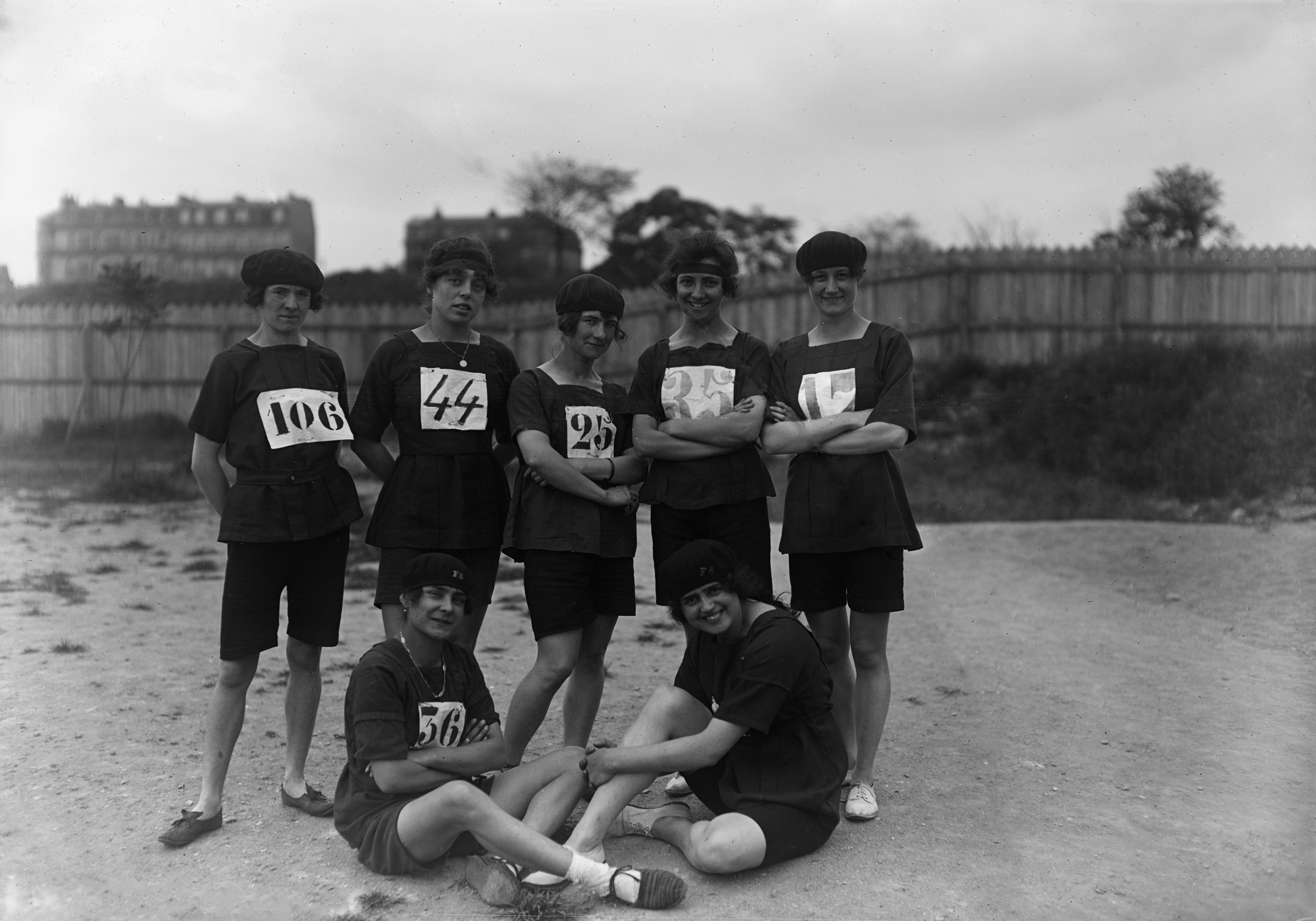 6/6/20, stade Elisabeth, les athlètes féminines Forget (106), Suzanne Liébrard (44), Germaine Delapierre (25), Lucie Cadiès (35), Thérèse Brulé (17), Lucie Bréard (36) et Jeanne Janiaud.